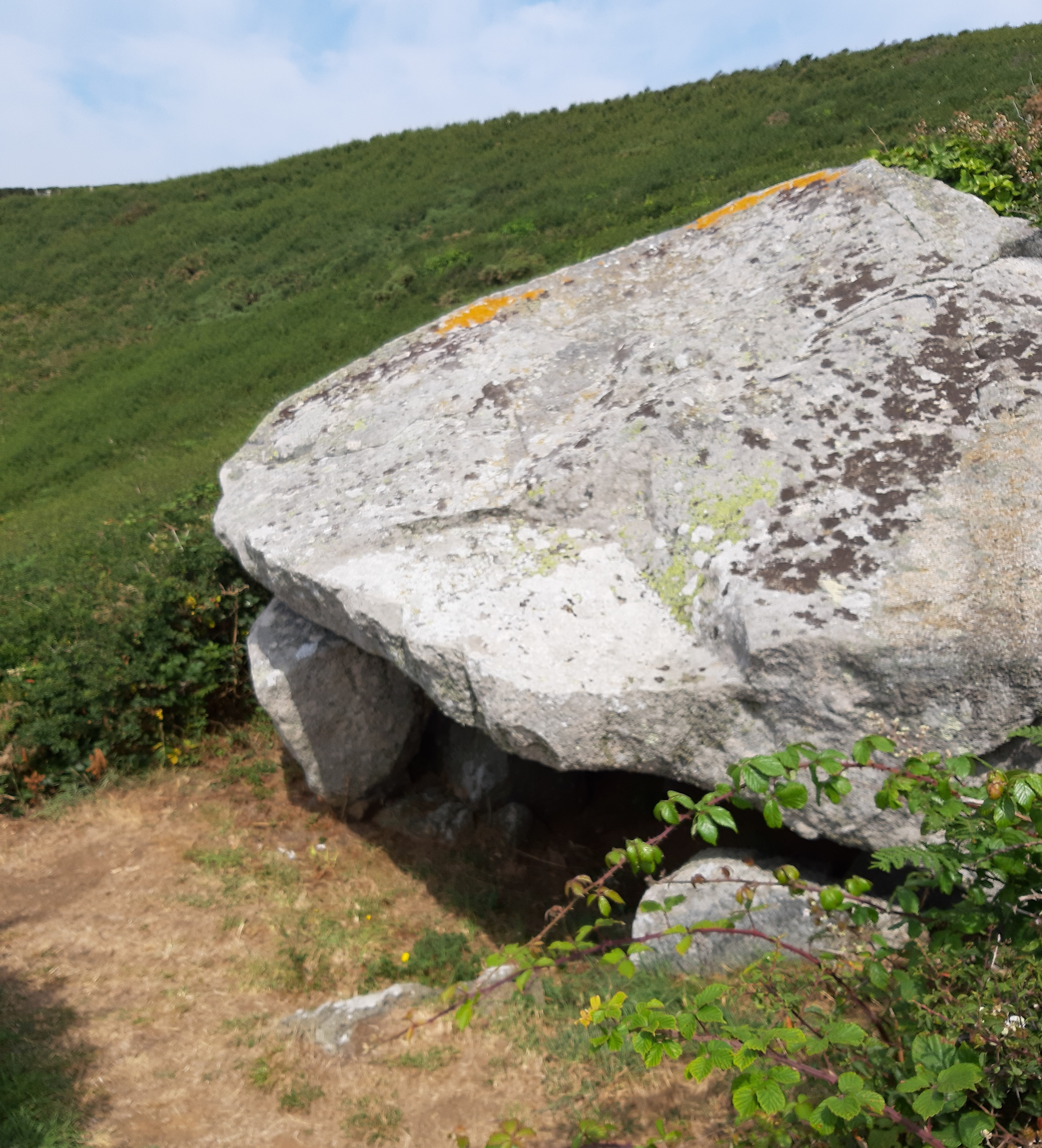 Die Dolmen auf Little Sark. Bild von vorne.